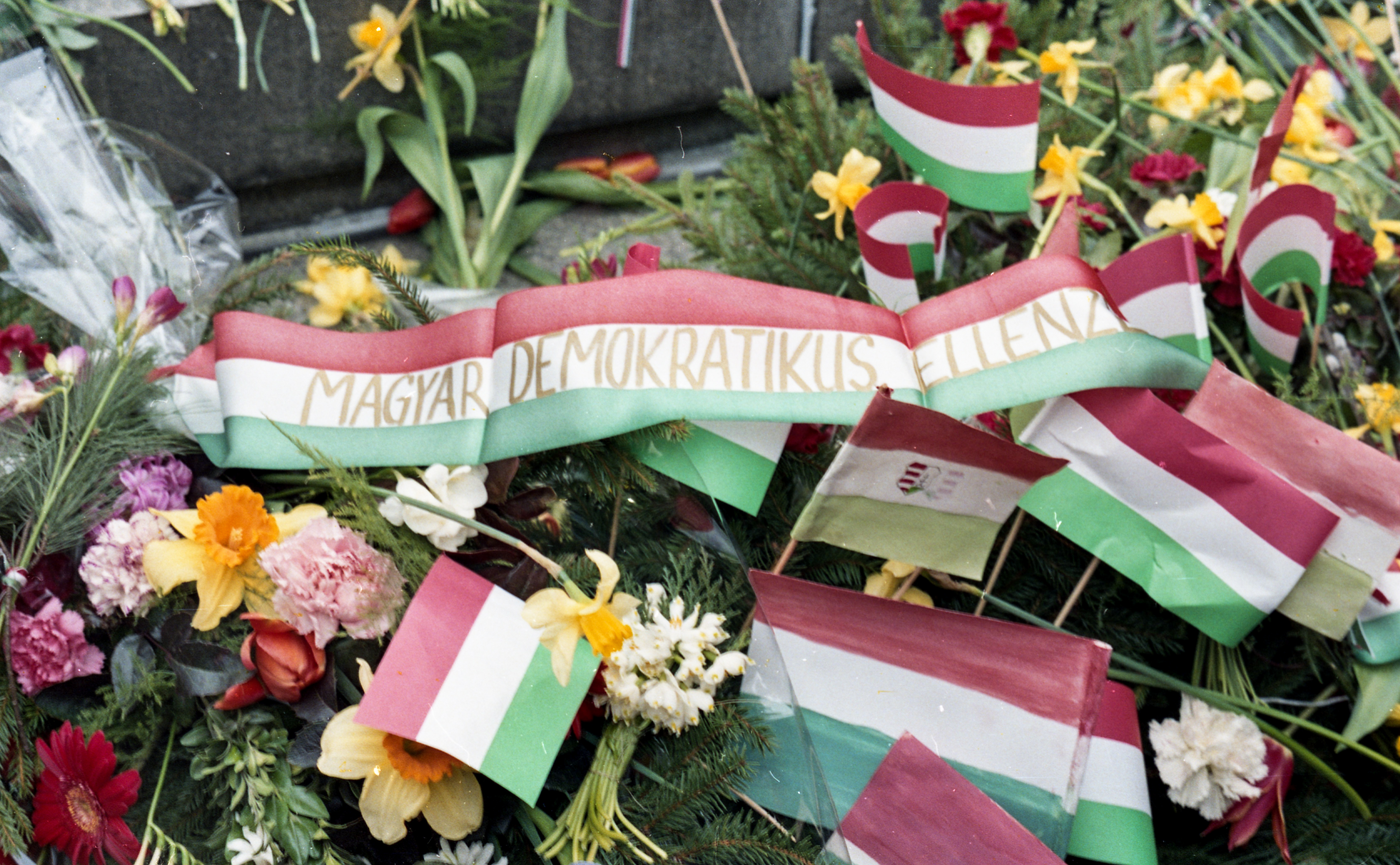 Petőfi tér, a Petőfi-szobor talapzata március 15-én. Location: Hungary, Budapest V. Tags: colorful, Budapest, politics, national emblem, flower, flag Title: Petőfi tér, a Petőfi-szobor talapzata március 15-én.